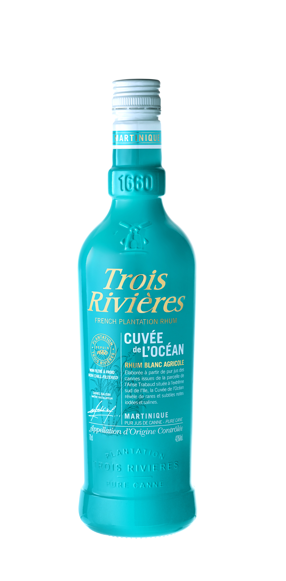 Bouteille Laqué Bleue - Trois Rivières - Cuvée de l'Océan